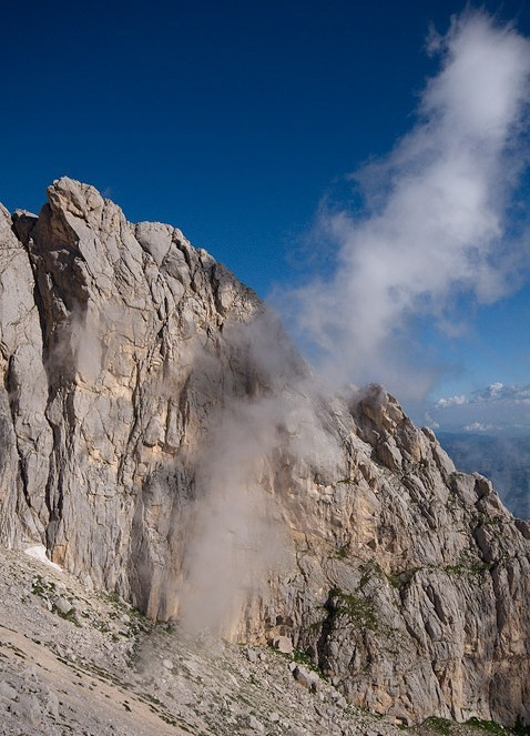 Il Corno Piccolo del Gran Sasso visto all'alba dal rifugio Franchetti .